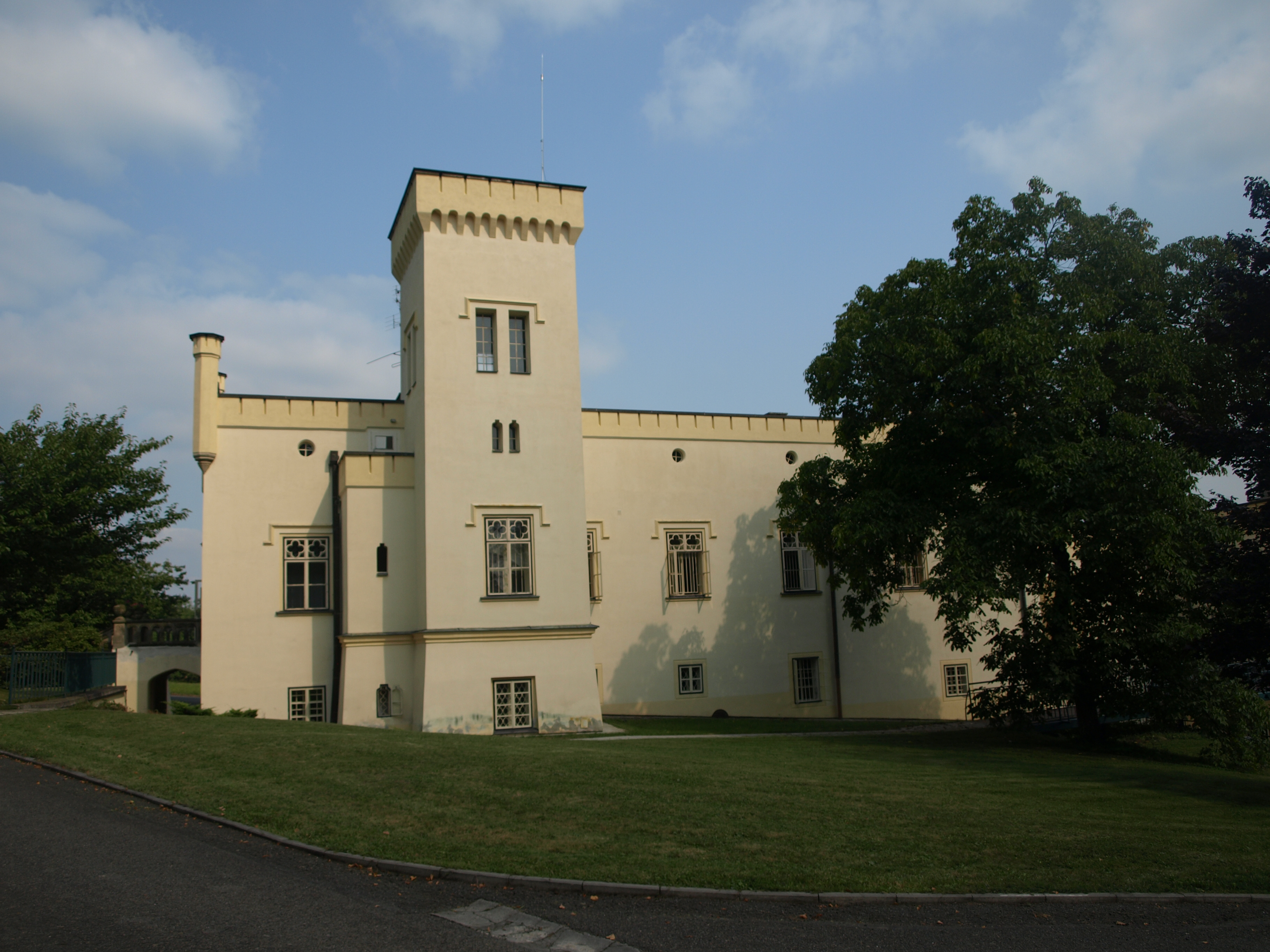 Zámek - lovecký zámeček Leontýn s angl. parkem Leontýn, Leontýn 84